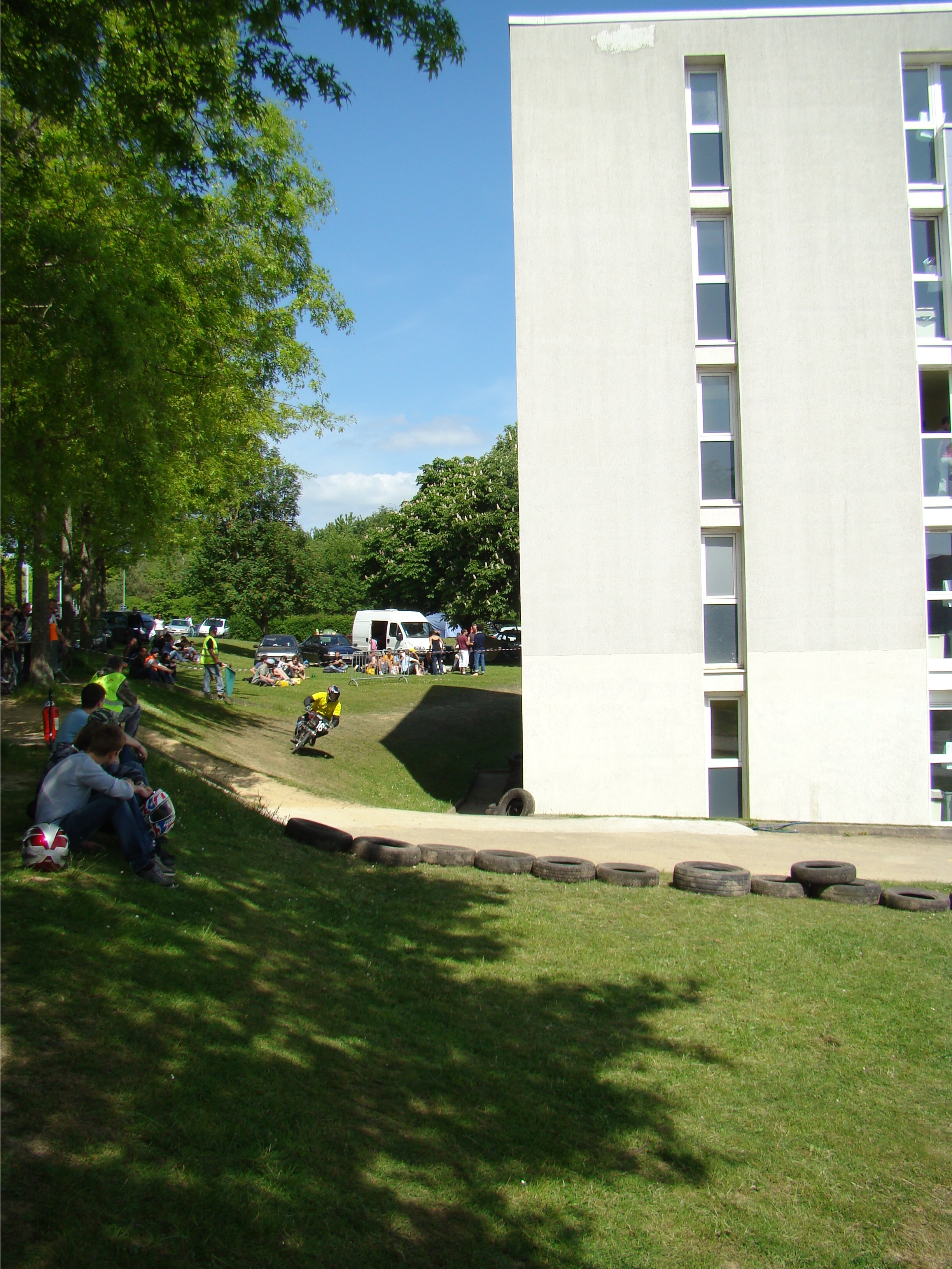 Le virage du C durant le Rock'n Solex 2009, avec passage de l'équipe 16.